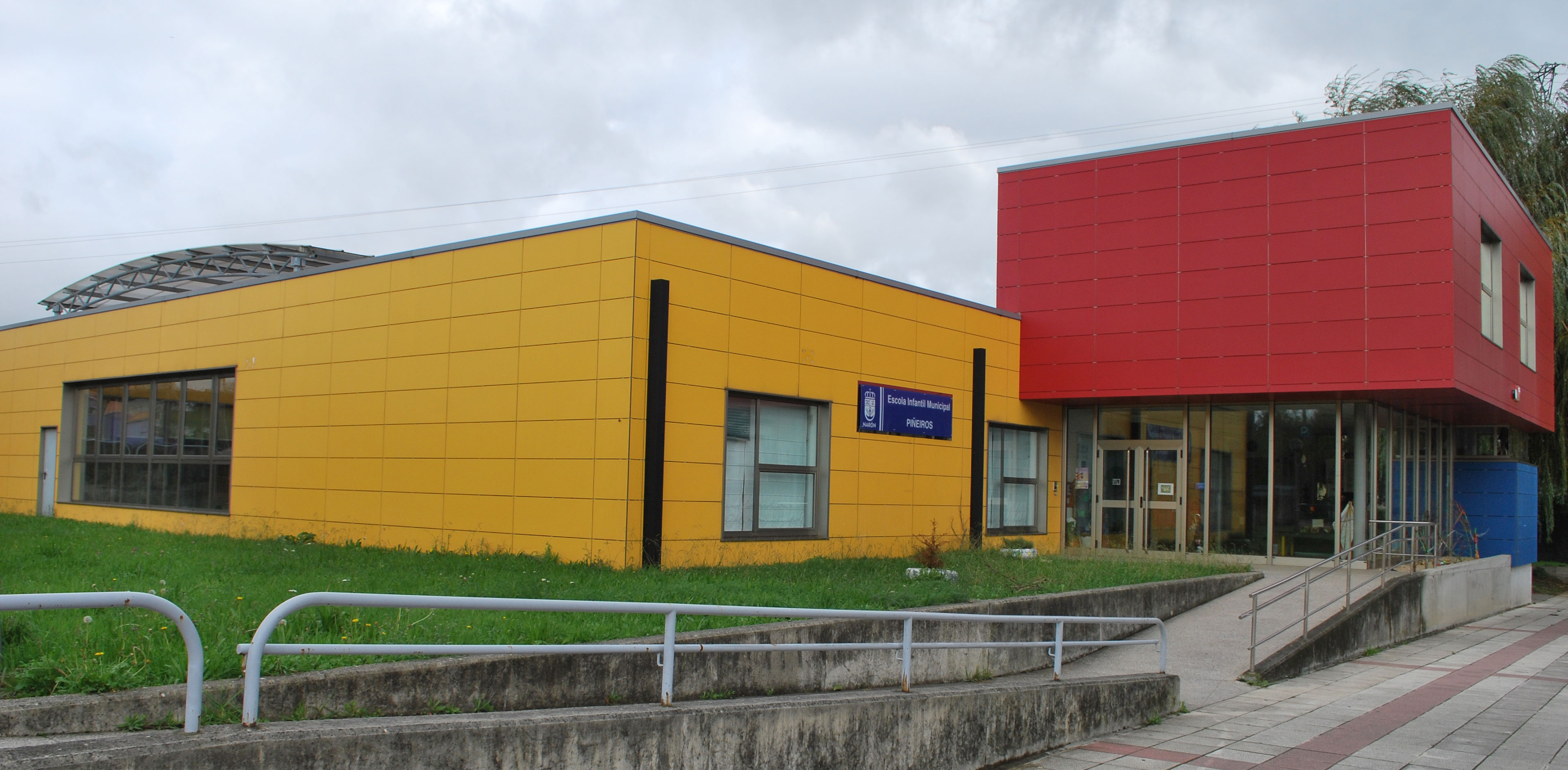 Vista da Escola Infantil de Piñeiros en Narón A Coruña Galiza Spain